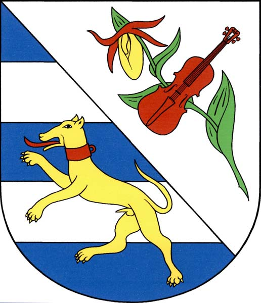 Znak obce Křečovice